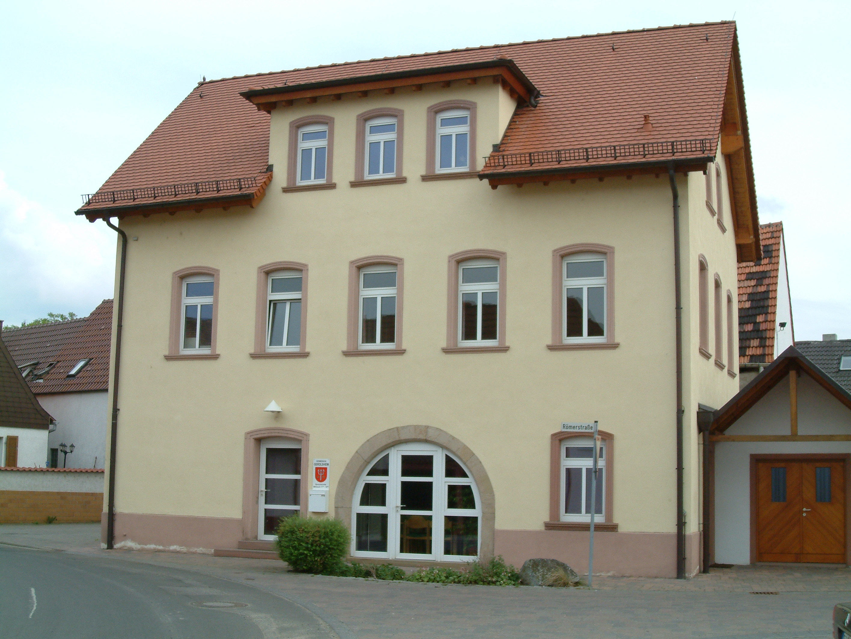 Rathaus zu Gerolsheim, selbst fotografiert am 2006-05-16 und freigegeben durch Benutzer:Mundartpoet